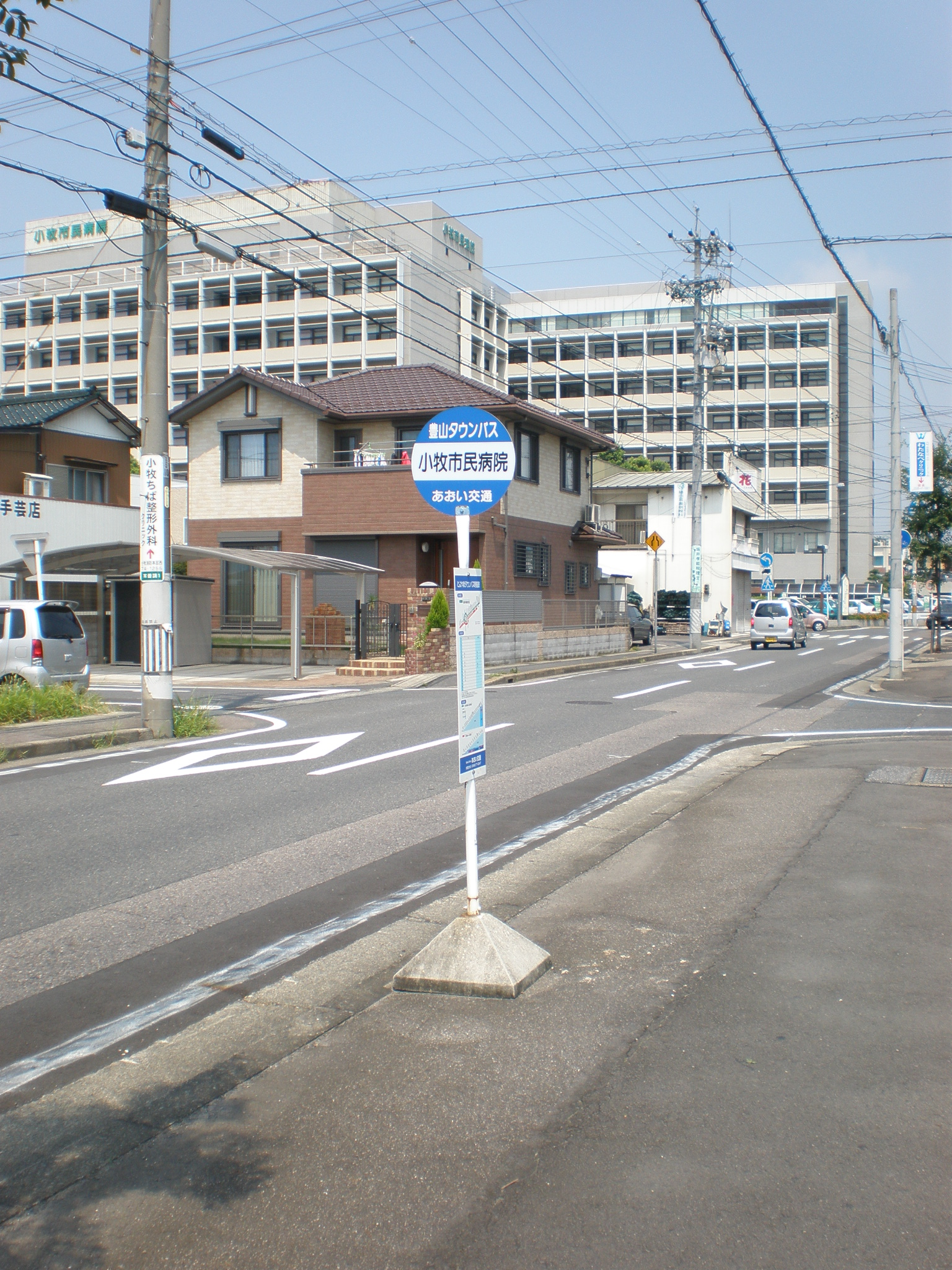 愛知県小牧市にあるとよやまタウンバスの小牧市民病院停留所